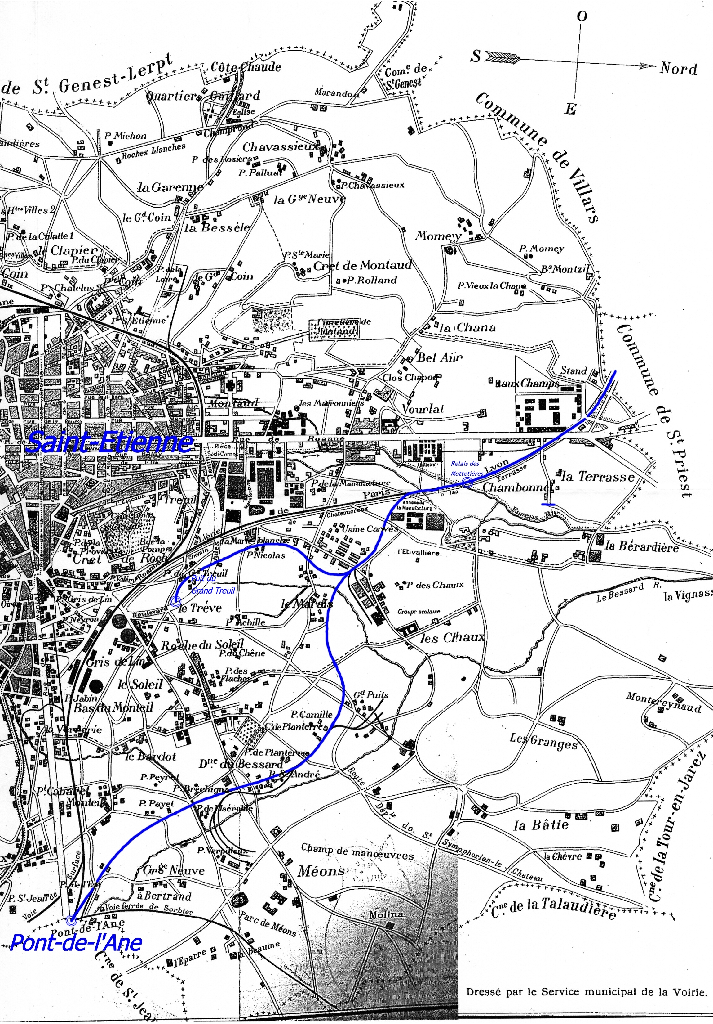 Vue partielle du plan de la ville de Saint-Étienne (1897)